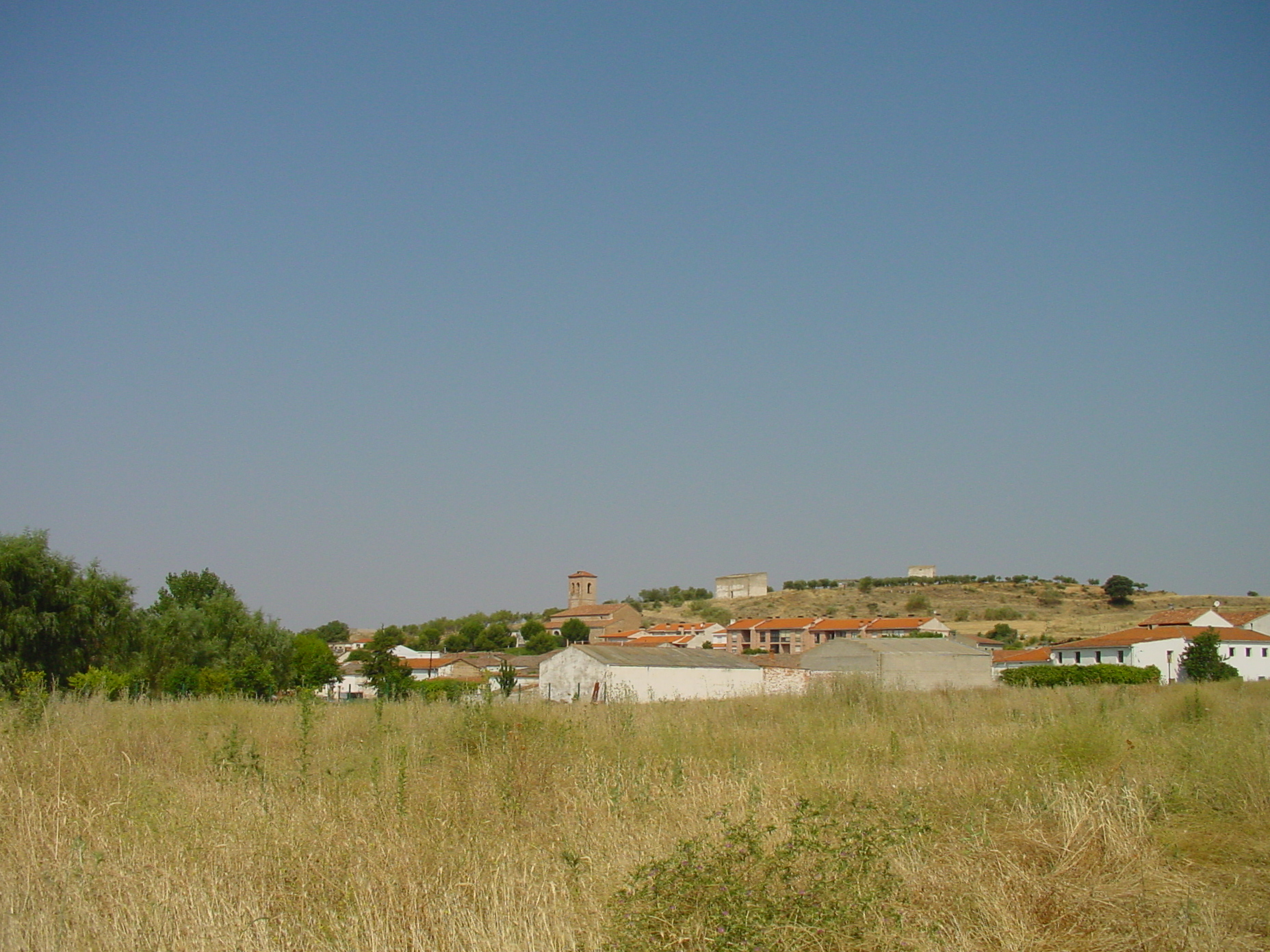 Vista de Valdeavero.